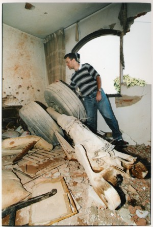 Eu e o trem de pouso no quarto sobre o que era uma cama